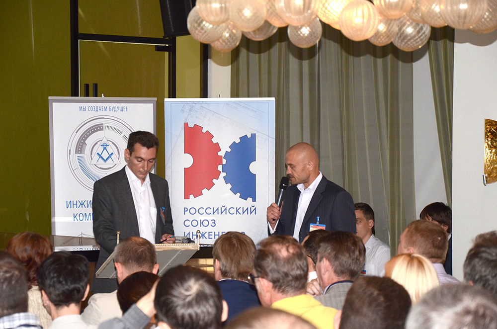 Семинар РСИ